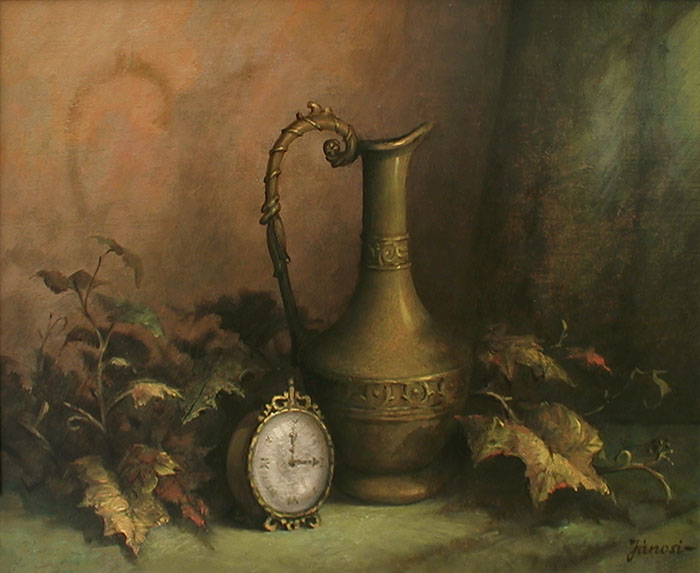 Jánosi Katalin (1951. november 2. -) magyar festő- és gobelinművész alkotása: Csend órával, 2002, olaj, 40x50 cm